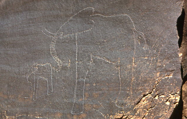 Gravures préhistoriques de la région d'El Bayadh, Algérie